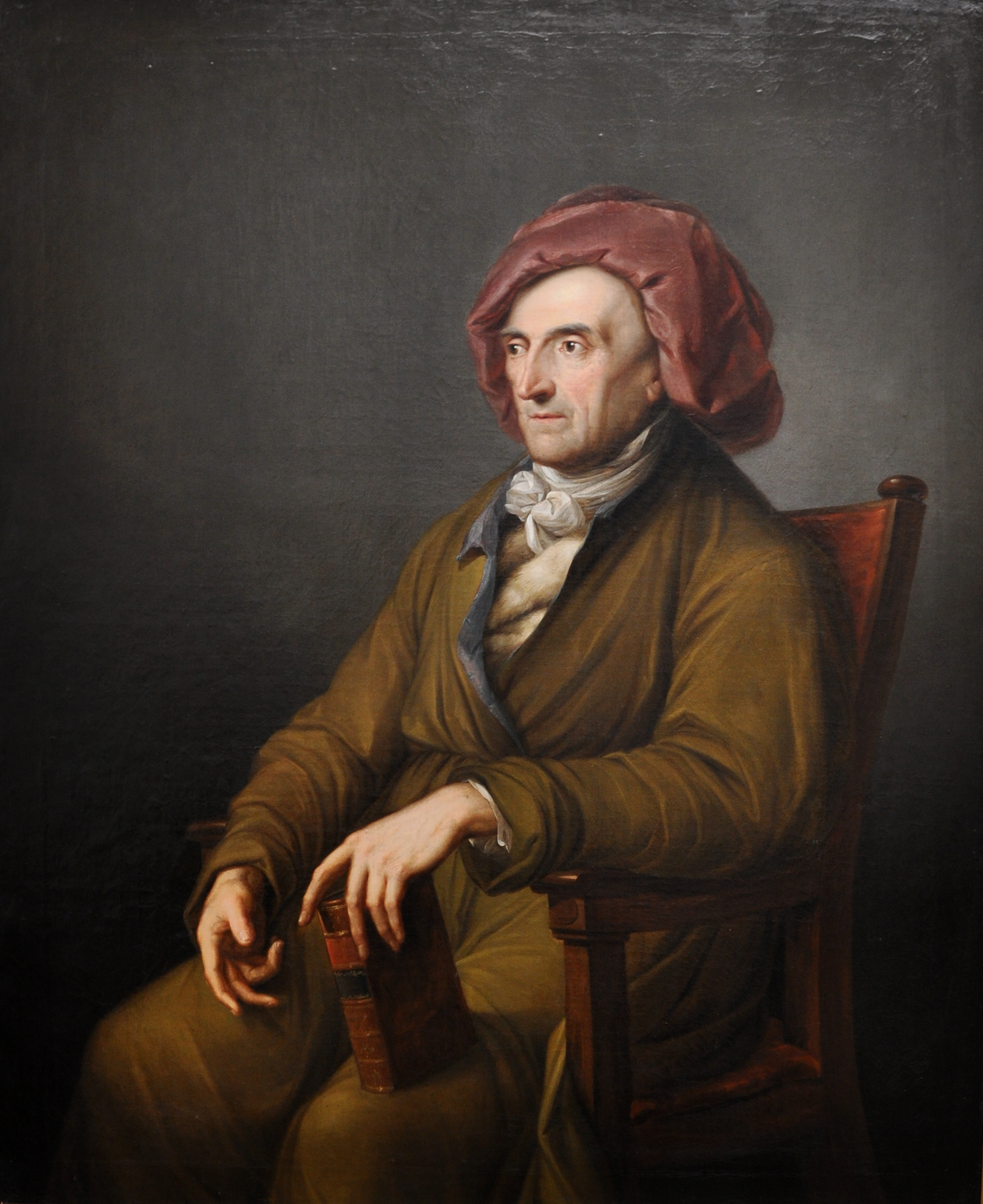 Der Abt Jerusalem, Vater des „jungen Werther“